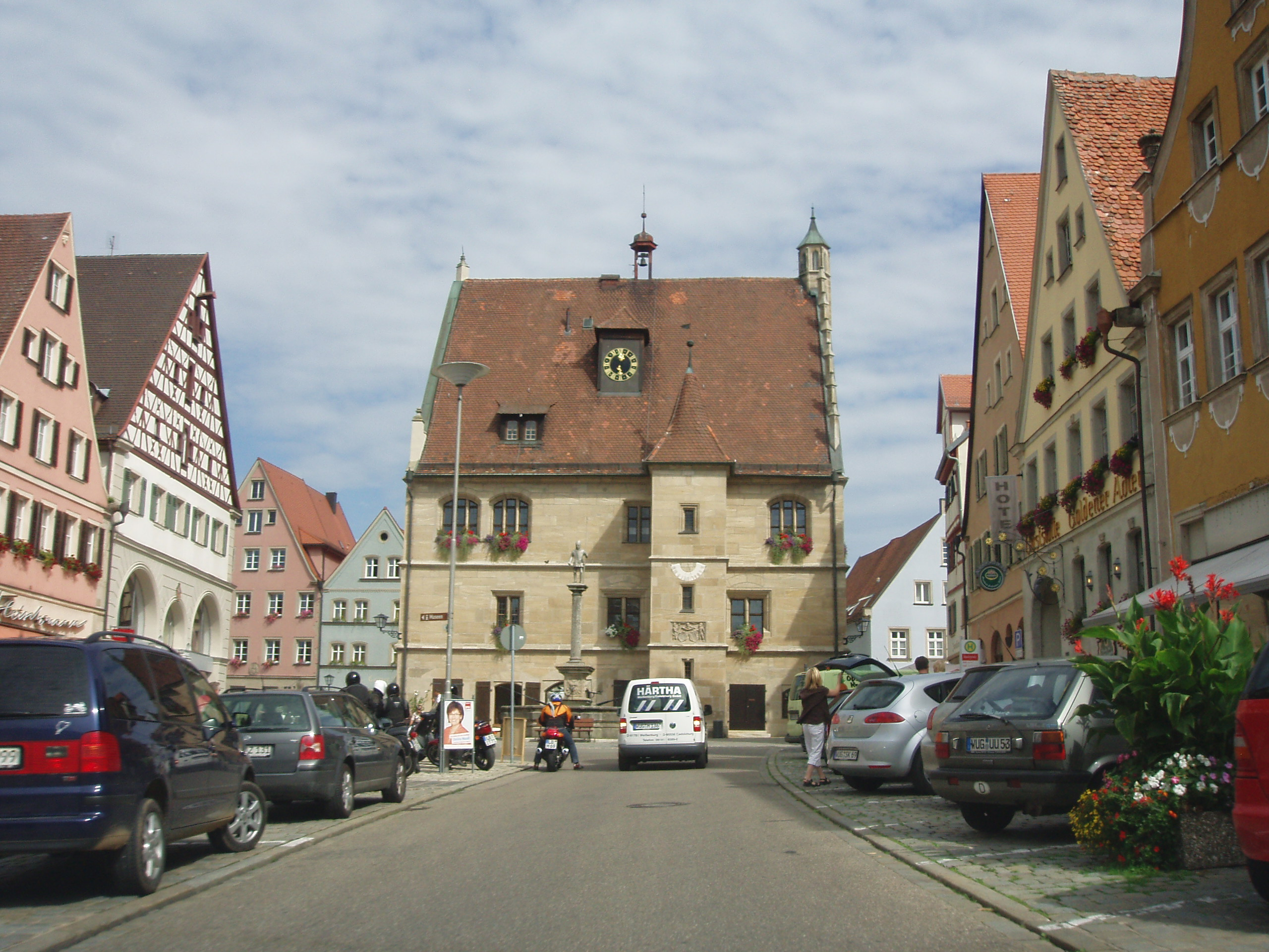 Rathaus in Weißenburg in Bayern